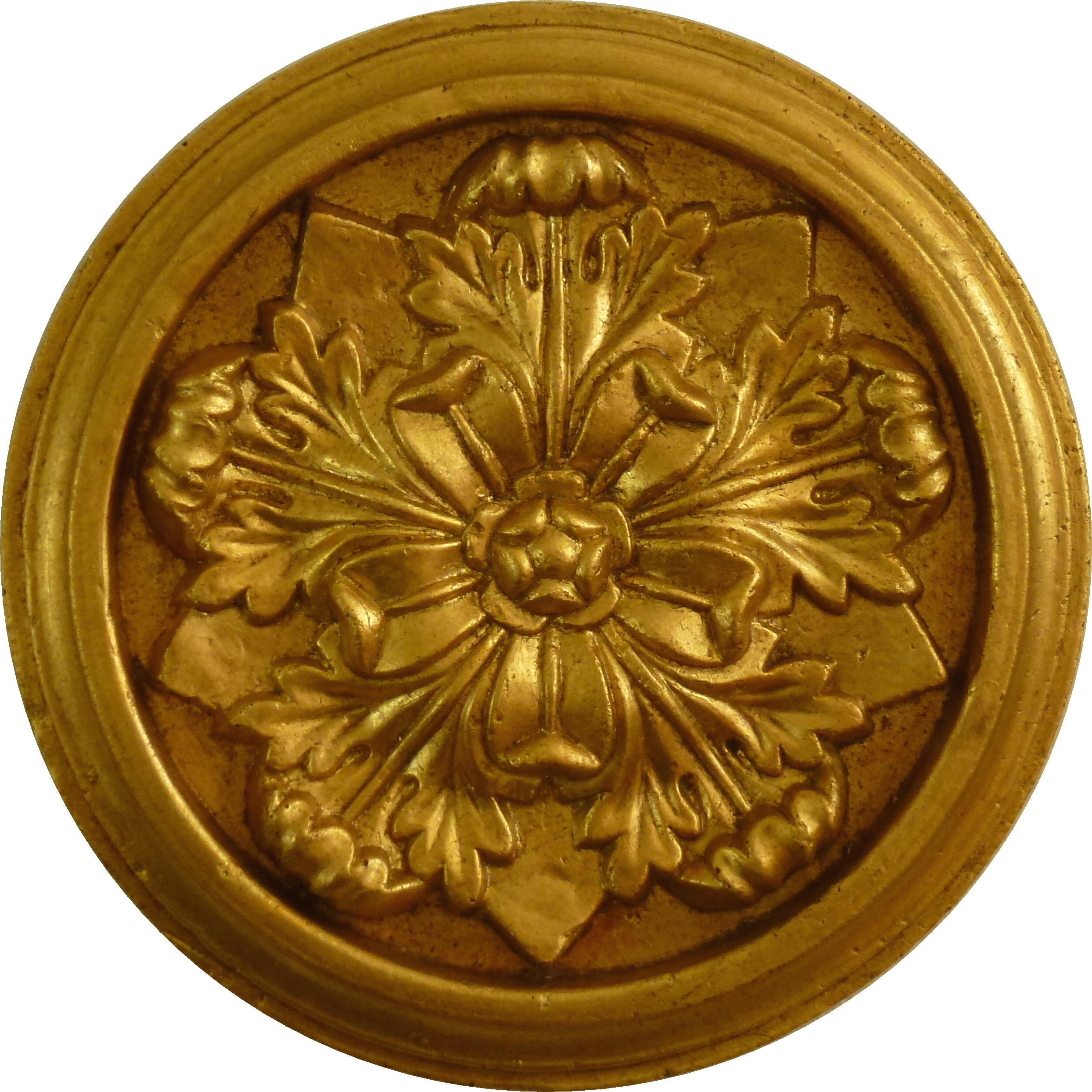 Fullerstarosetten är en avgjutning av fönstersosetten på Fullersta gård